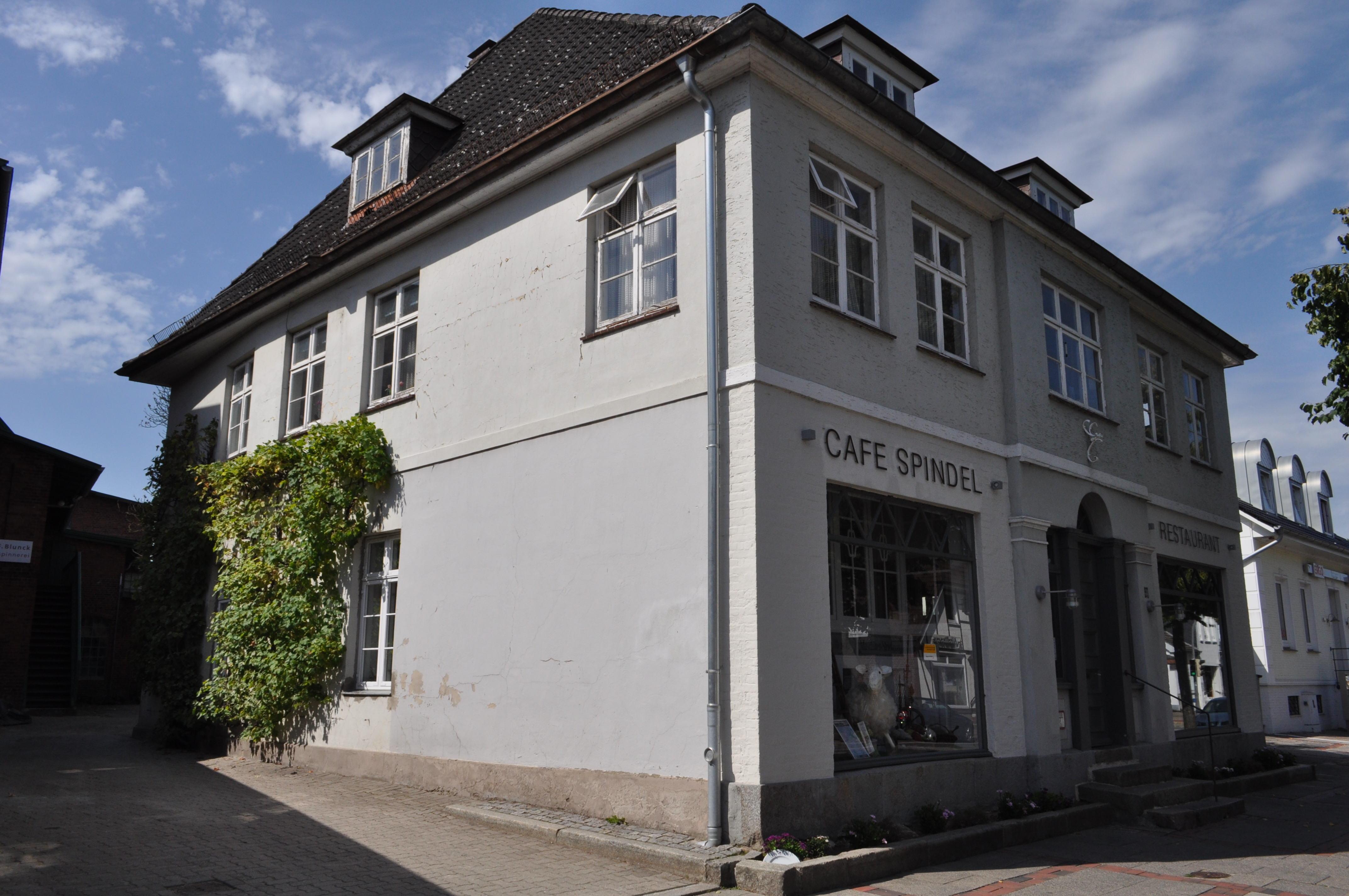 Kurhausstraße 38 in Bad Segeberg. This is a photograph of an architectural monument. .2